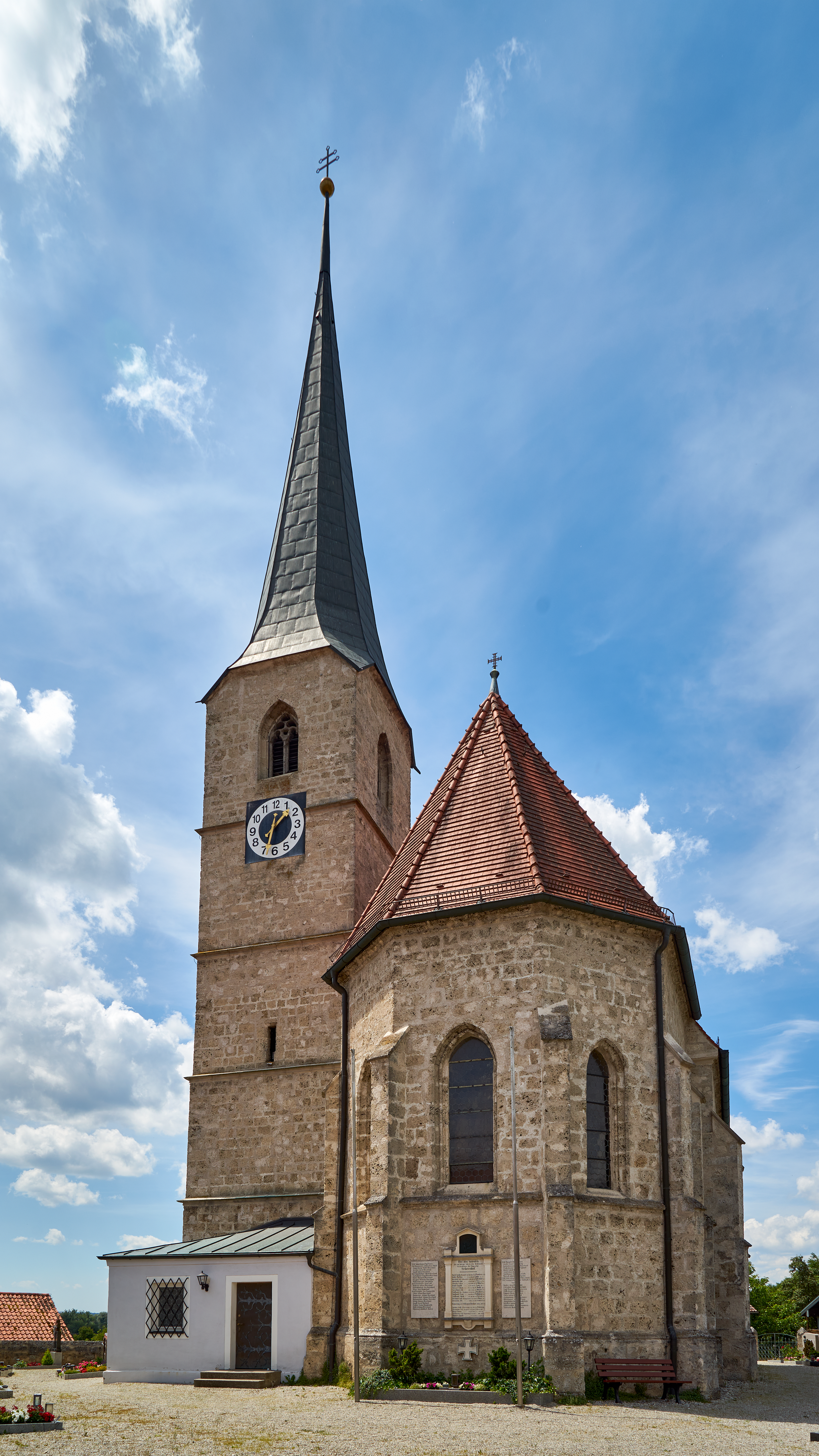 Katholische Filialkirche St. Jakobus der Ältere Seibersdorf, einschiffiger spätgotischer Tuffsteinquaderbau mit Turm südlich des Chors, um 1470/80, Turm 1646 erneuert; mit Ausstattung; Friedhofsmauer aus Tuffstein, 15./17. Jahrhundert, Ansicht von Osten